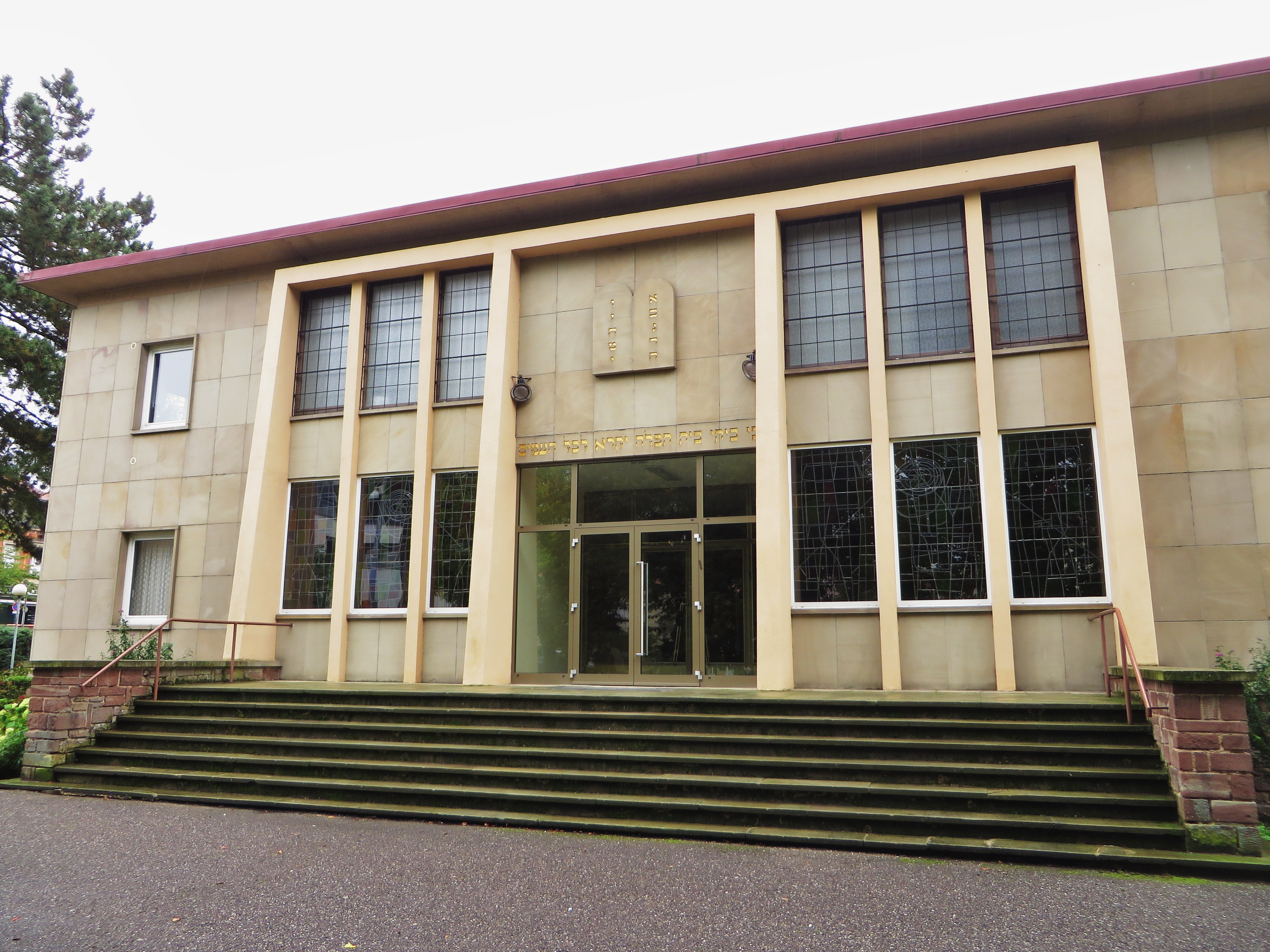 Sarreguemines synagogue